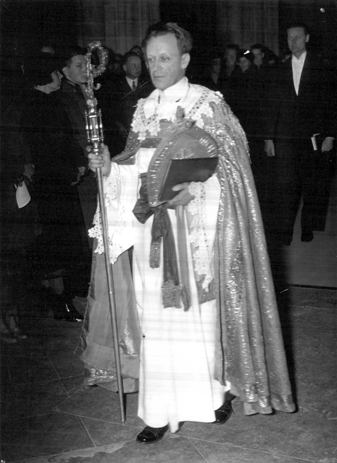 Ärkebiskopen i Uppsala på väg upp till altaret.